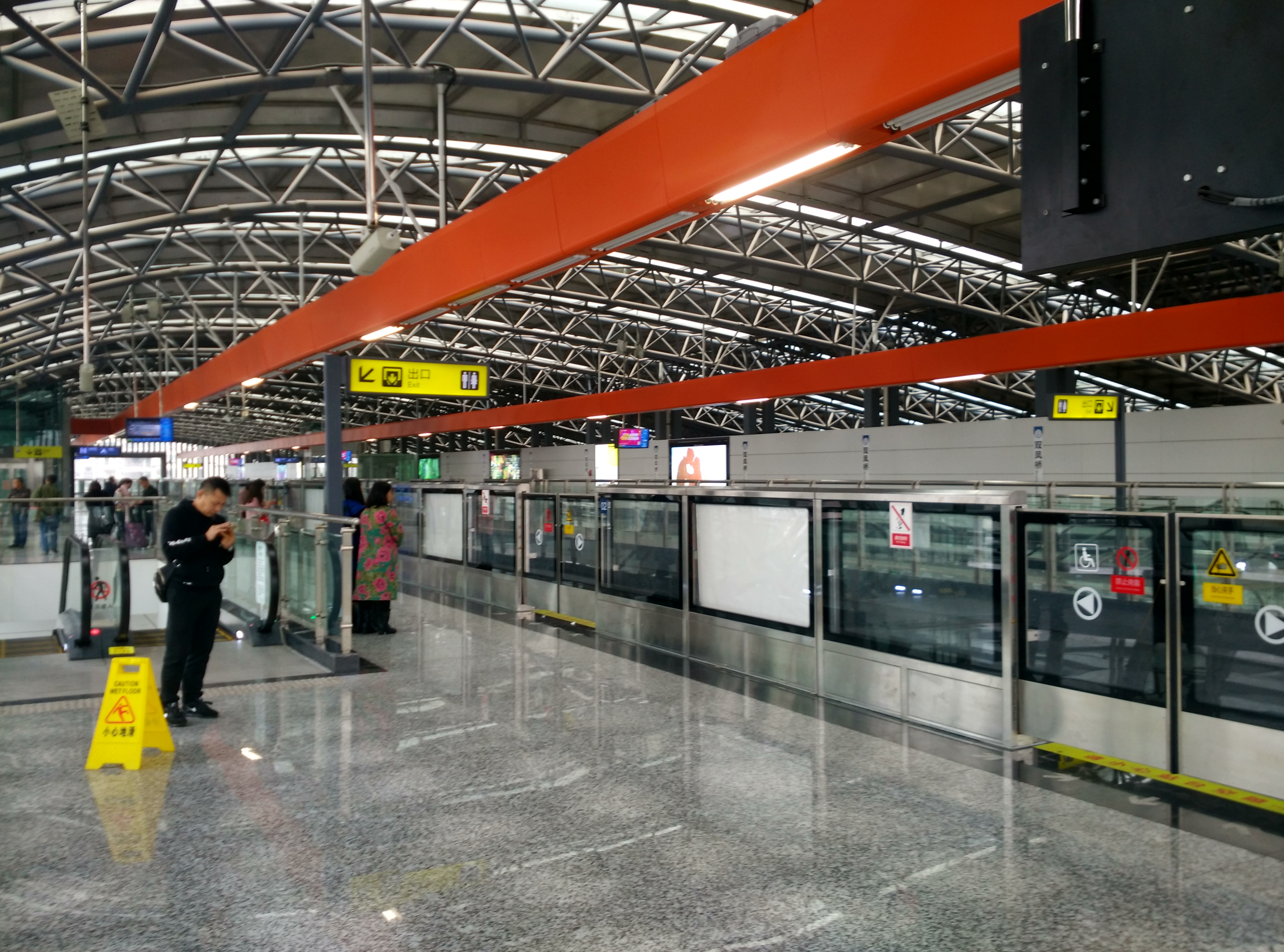 中文（中国大陆）: 双凤桥站站台